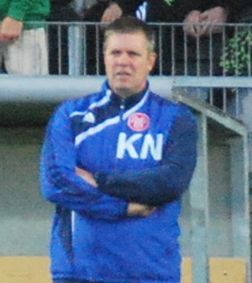 Fodboldtræneren Kent Nielsen fra AaB. Her i pokalkampen imellem Viborg FF og AaB på Viborg Stadion.